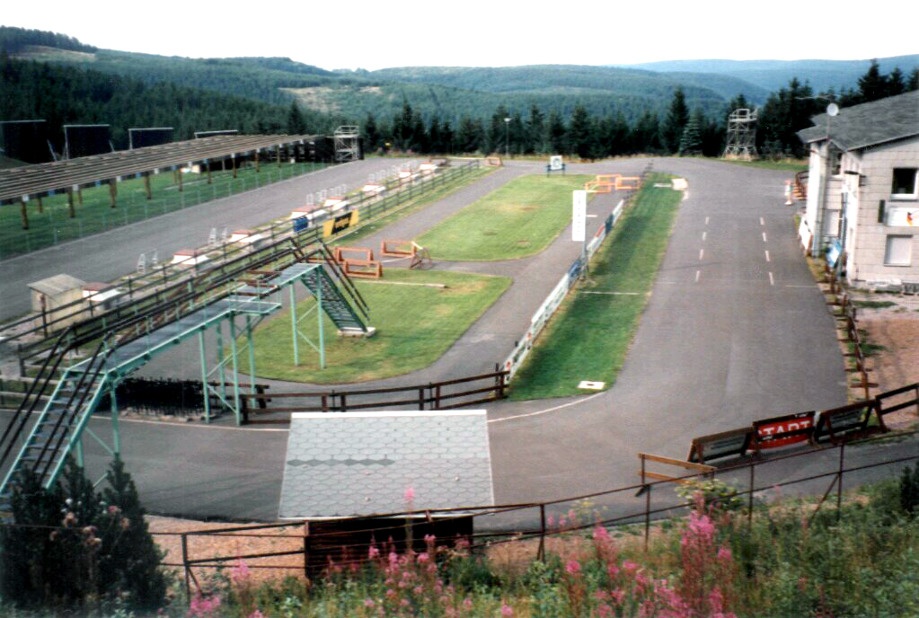 Biathlonstadion am Grenzadler